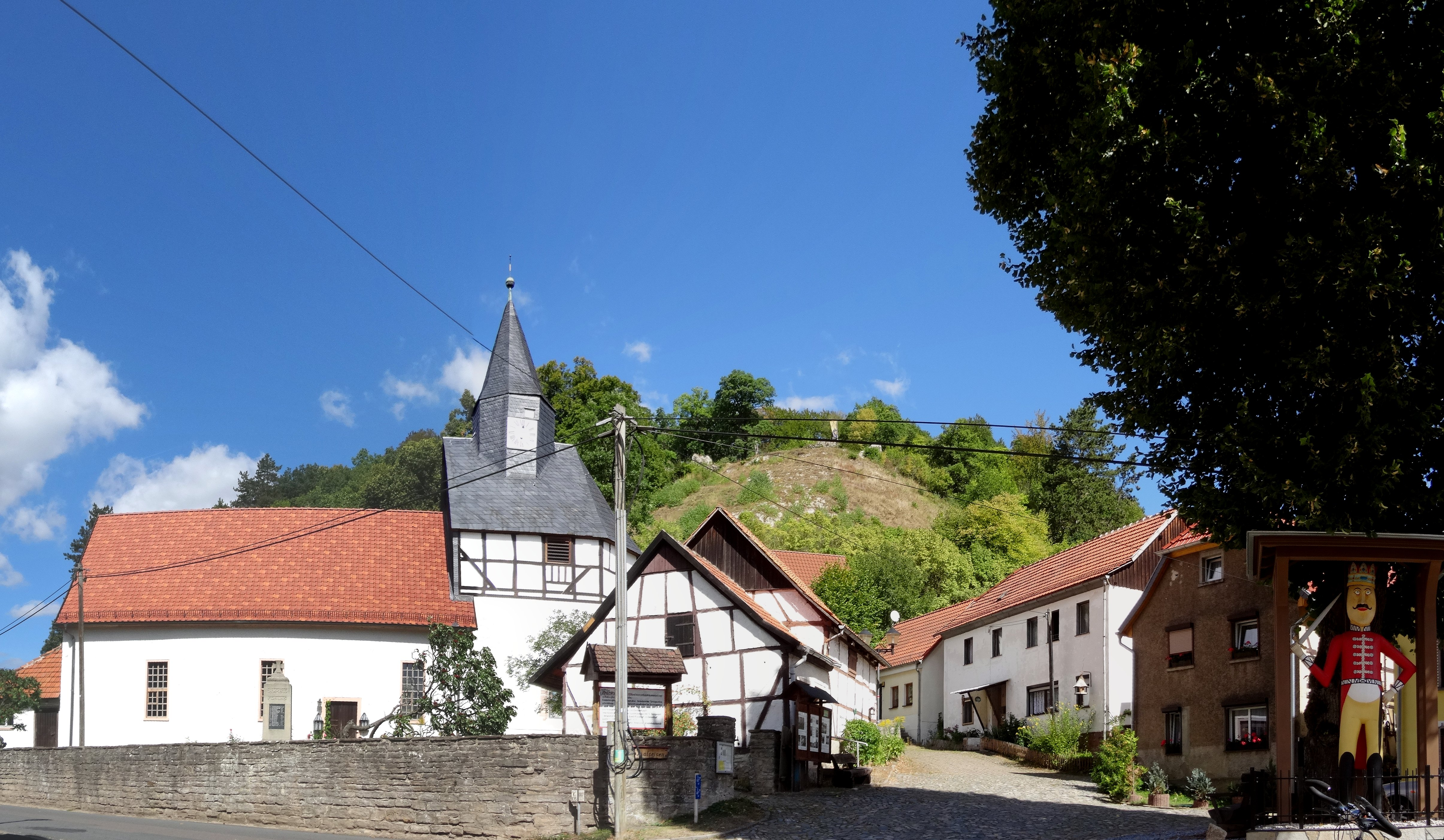 Questenberg Ortsmitte mit Dorfkirche St. Mariä Geburt, Questenburgruine und Questenberger Roland